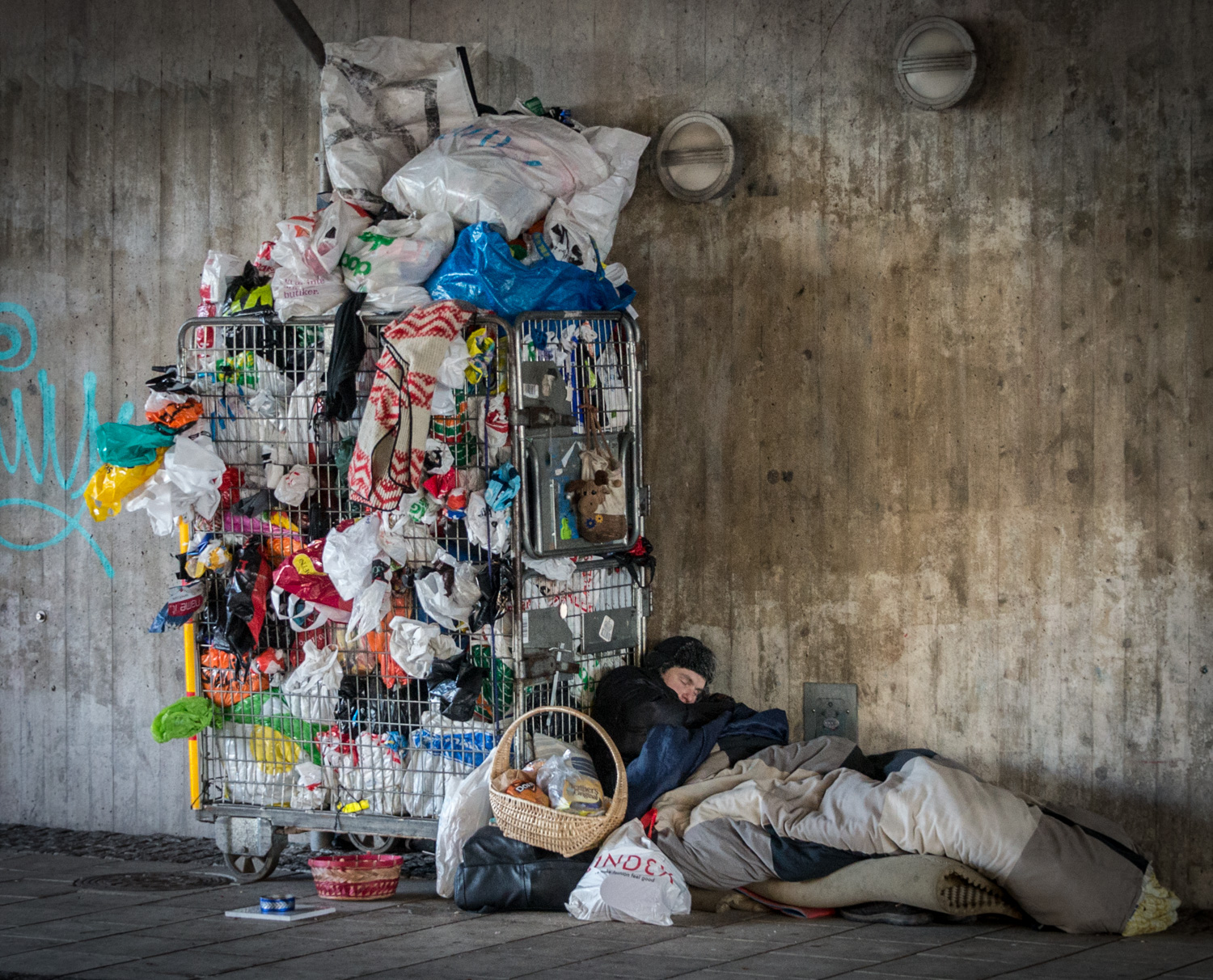 Hemlös i centrala Stockholm i januari 2017.